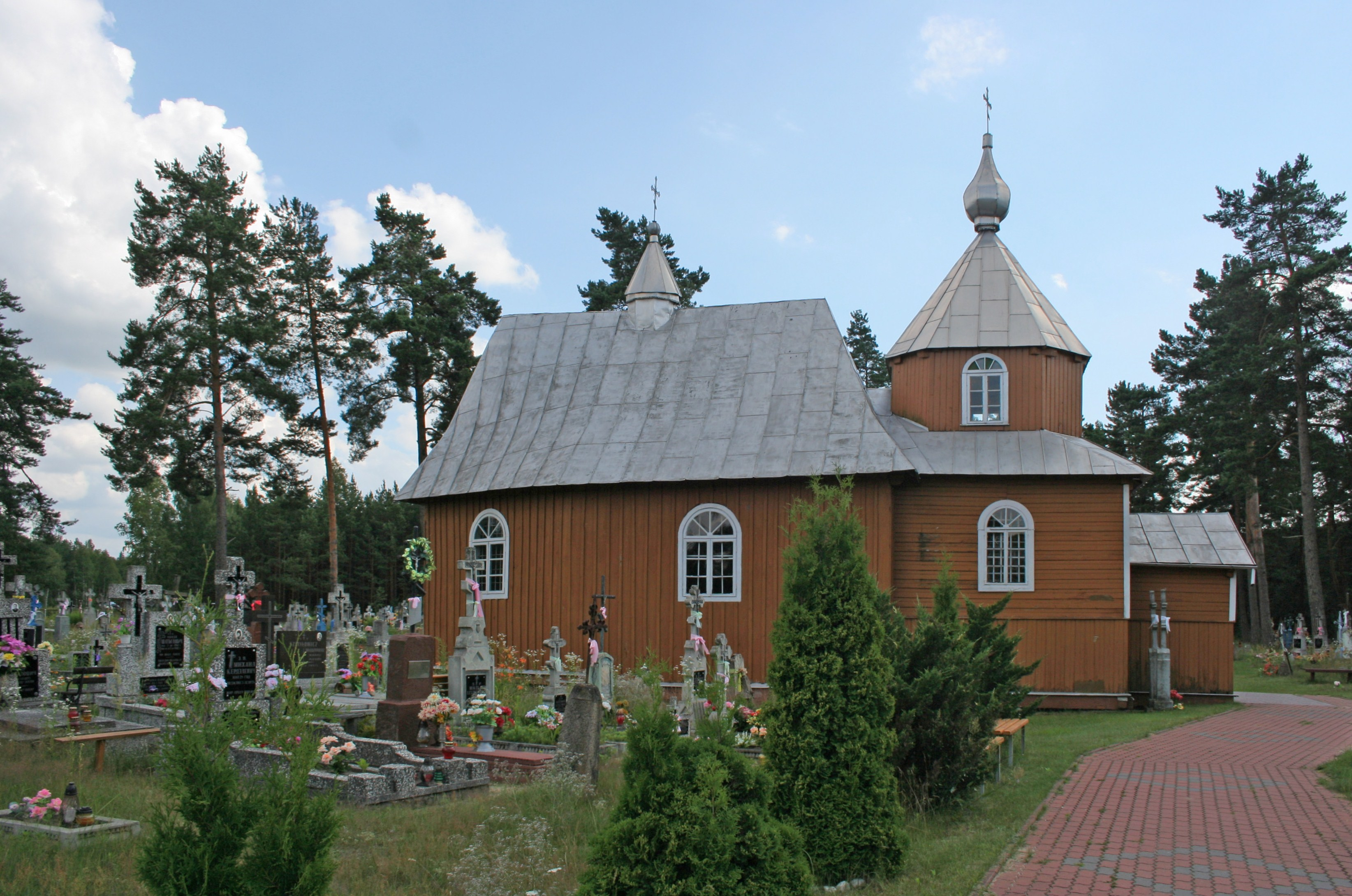 Cerkiew św. Kosmy i Damiana w Czeremczy-Wsi.